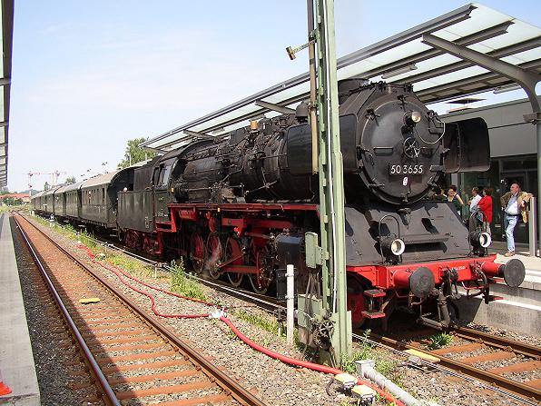 DR 50 3655 während einer Sonderfahrt im Bahnhof Halle (Westfalen) zum Stadtfest 2003.